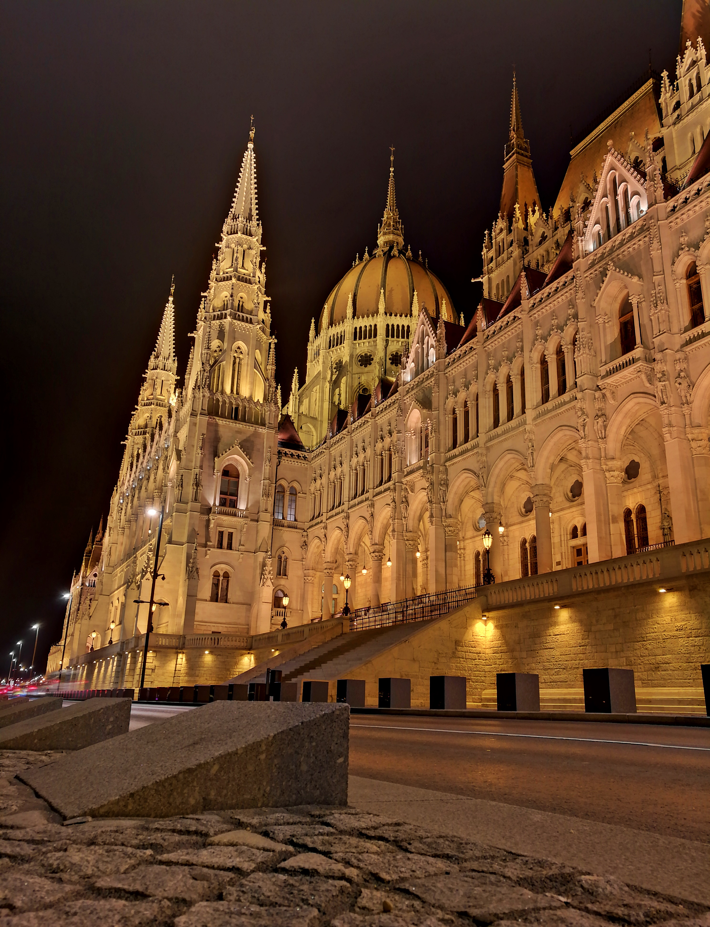 Az országház a 2011-ben kapott új díszkivilágítással